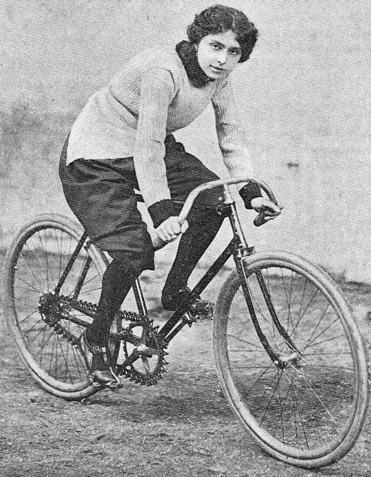 Hélène Dutrieu, franz. Radsportlerin. 1898